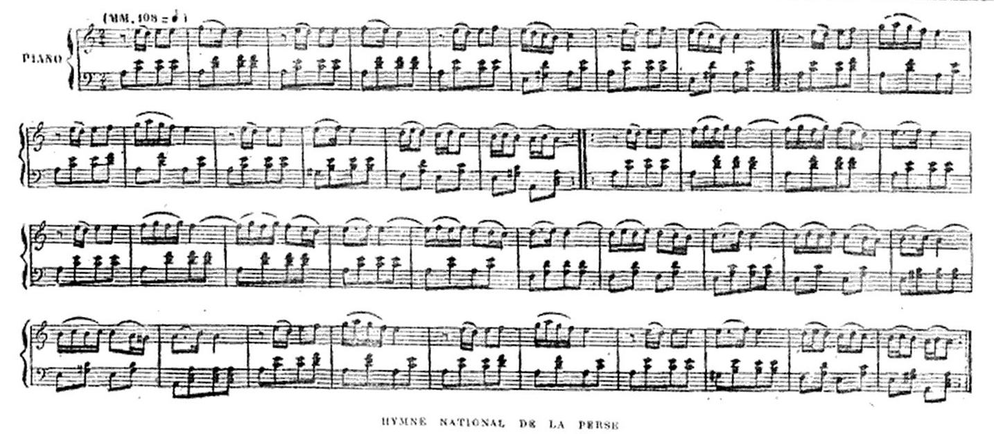 Partition de l'hymne national de la Perse.